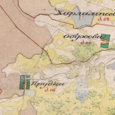 Деревня Пруды на карте 1850 года